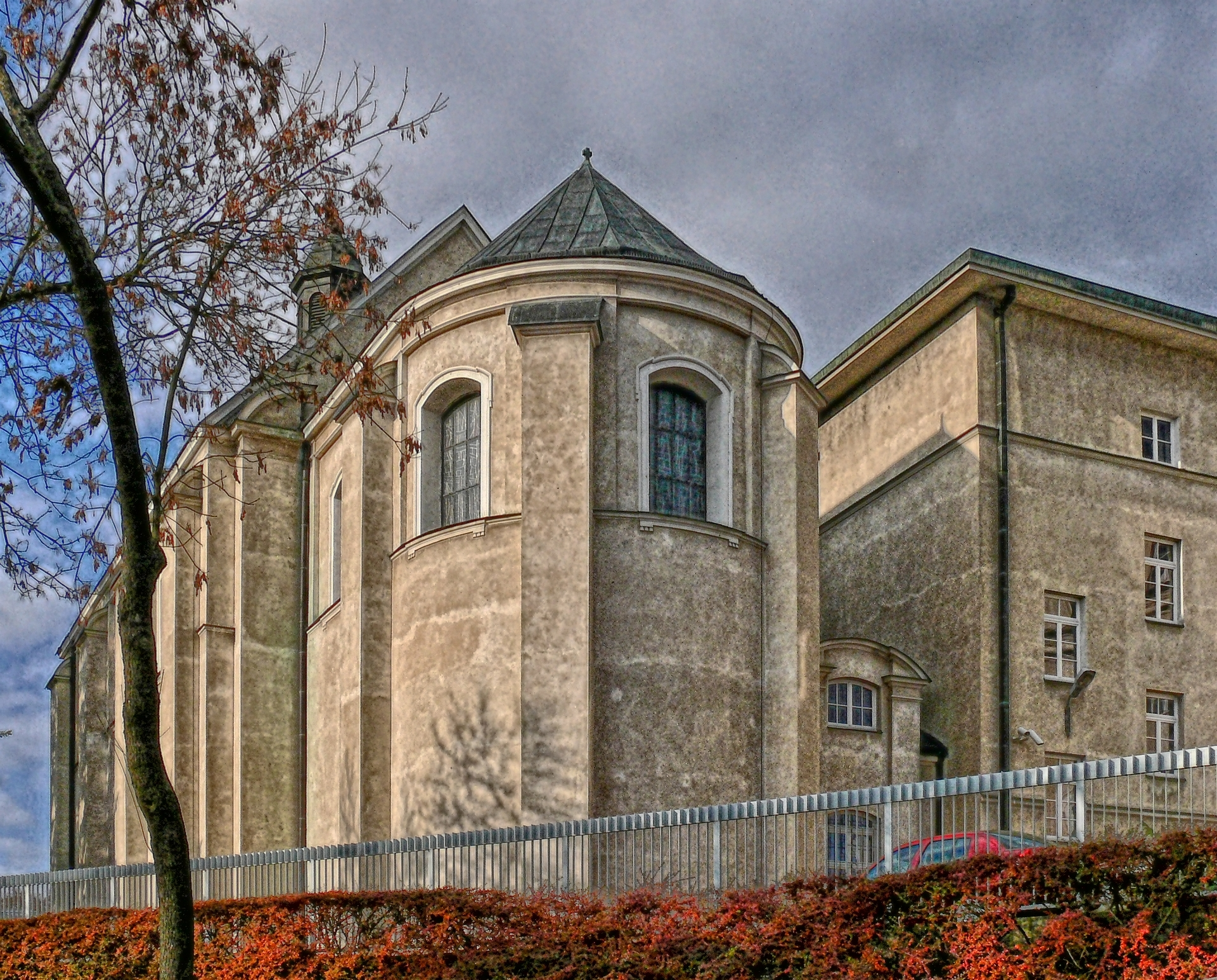 Kościół p.w. Św. Krzyża, znajdujący się na terenie Katolickiego Uniwersytetu Lubelskiego. Z racji położenia w centrum Miasteczka Akademickiego, nazywany jest Kościołem Akademickim.